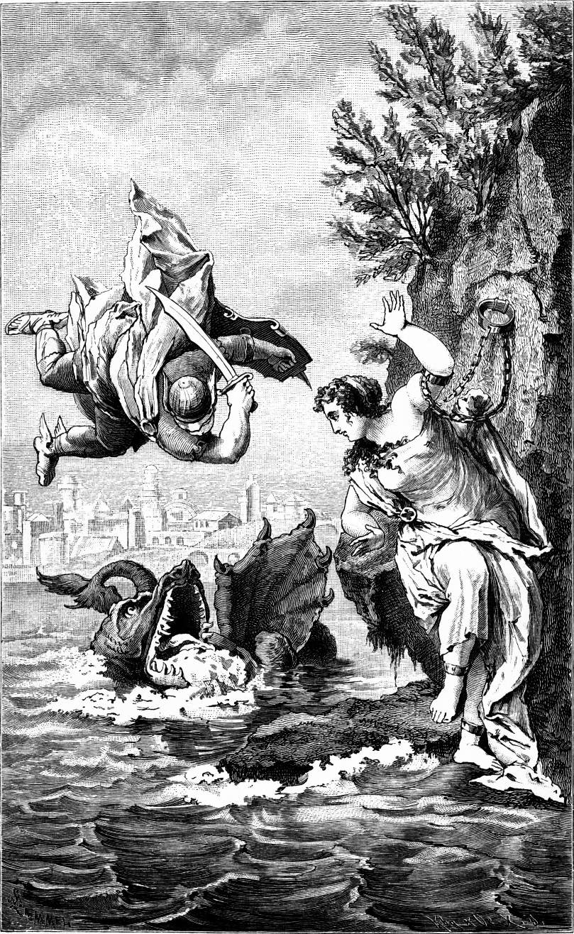 Illustration from Schwab, Gustav: “Die schönsten Sagen des klassischen Altertums” (1882)